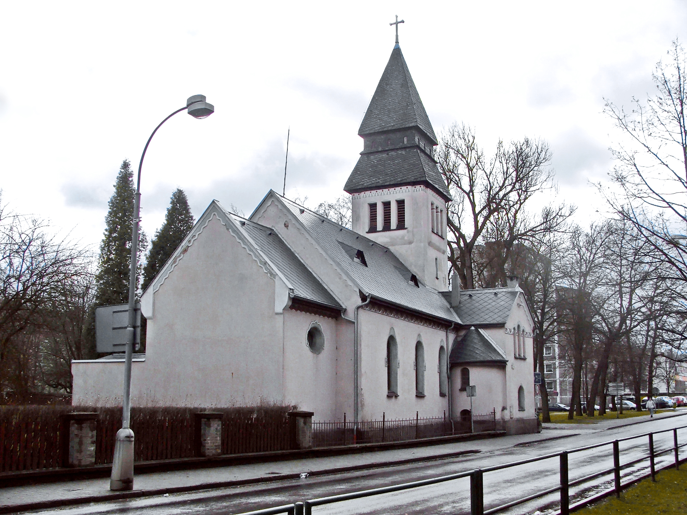 českobratrský kostel v Chodově u Karlových Varů